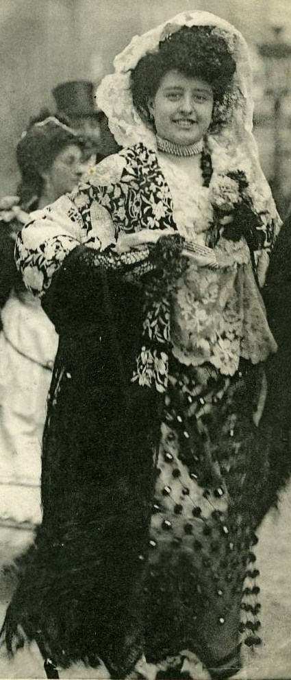 Concepcion Ledesma Reine de Madrid à la Mi-Carême 1906 à Paris